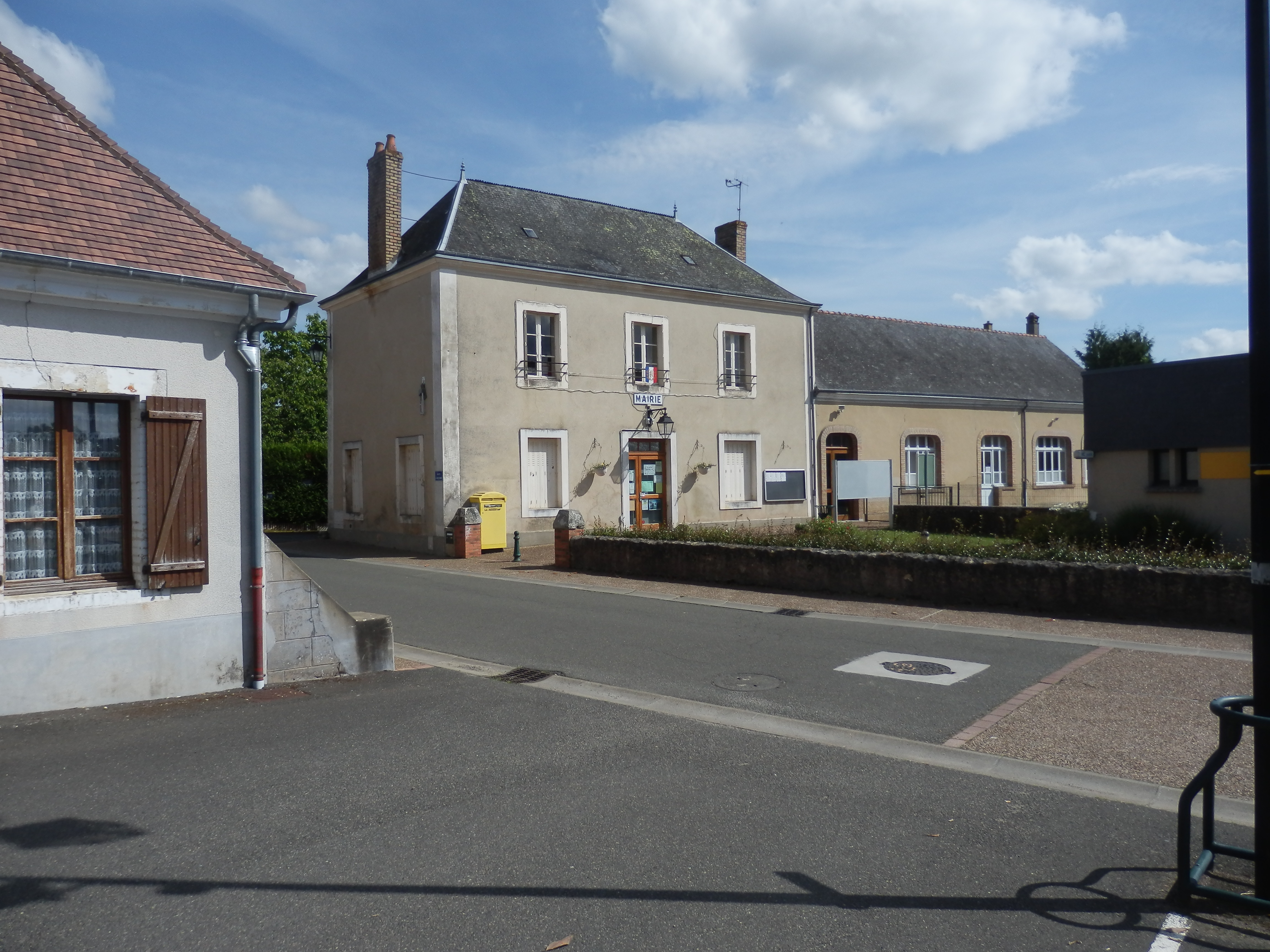 Mairie de Volnay